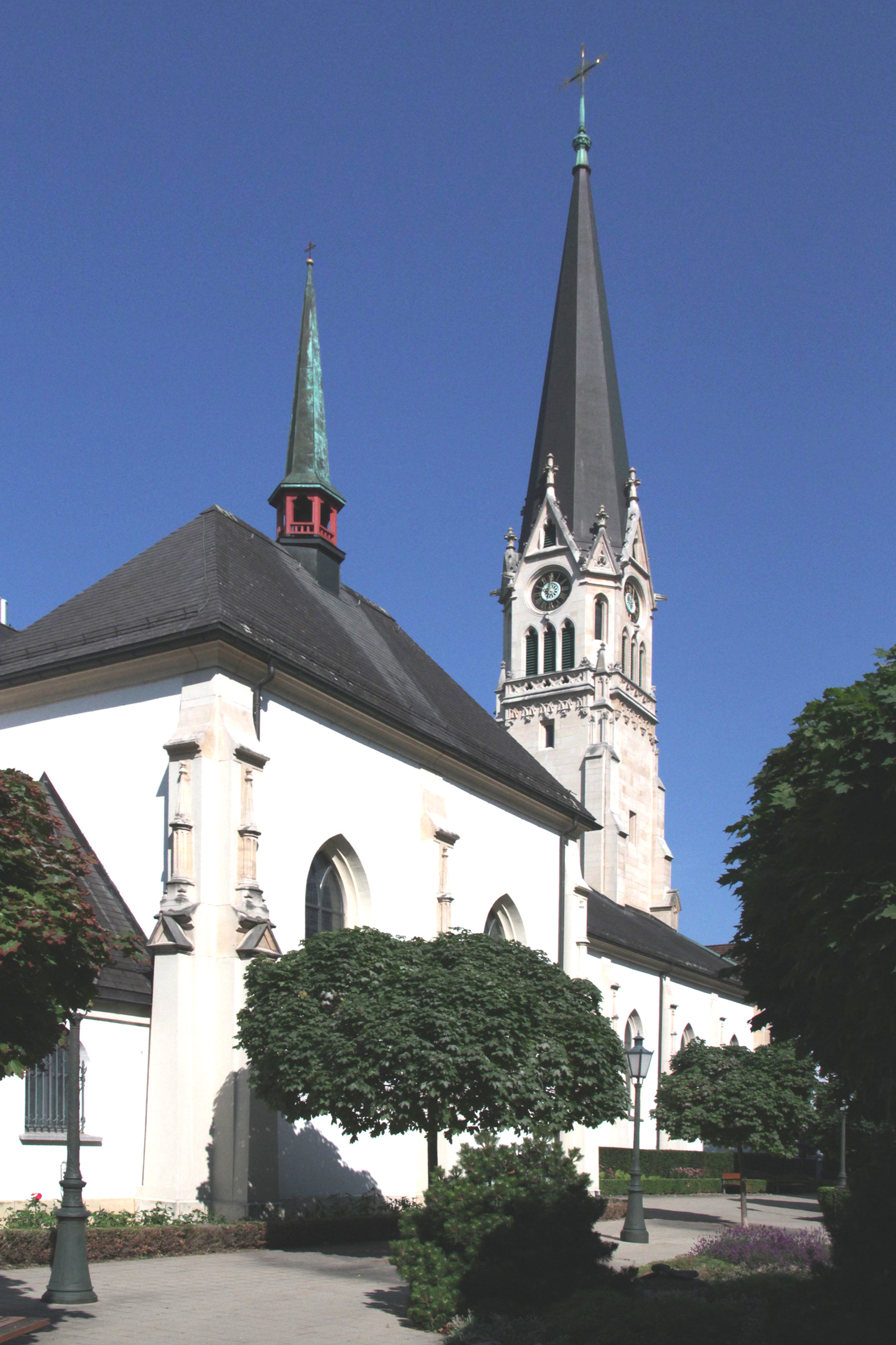 Römisch-katholische Kirche St. Peter und Paul (Zürich)